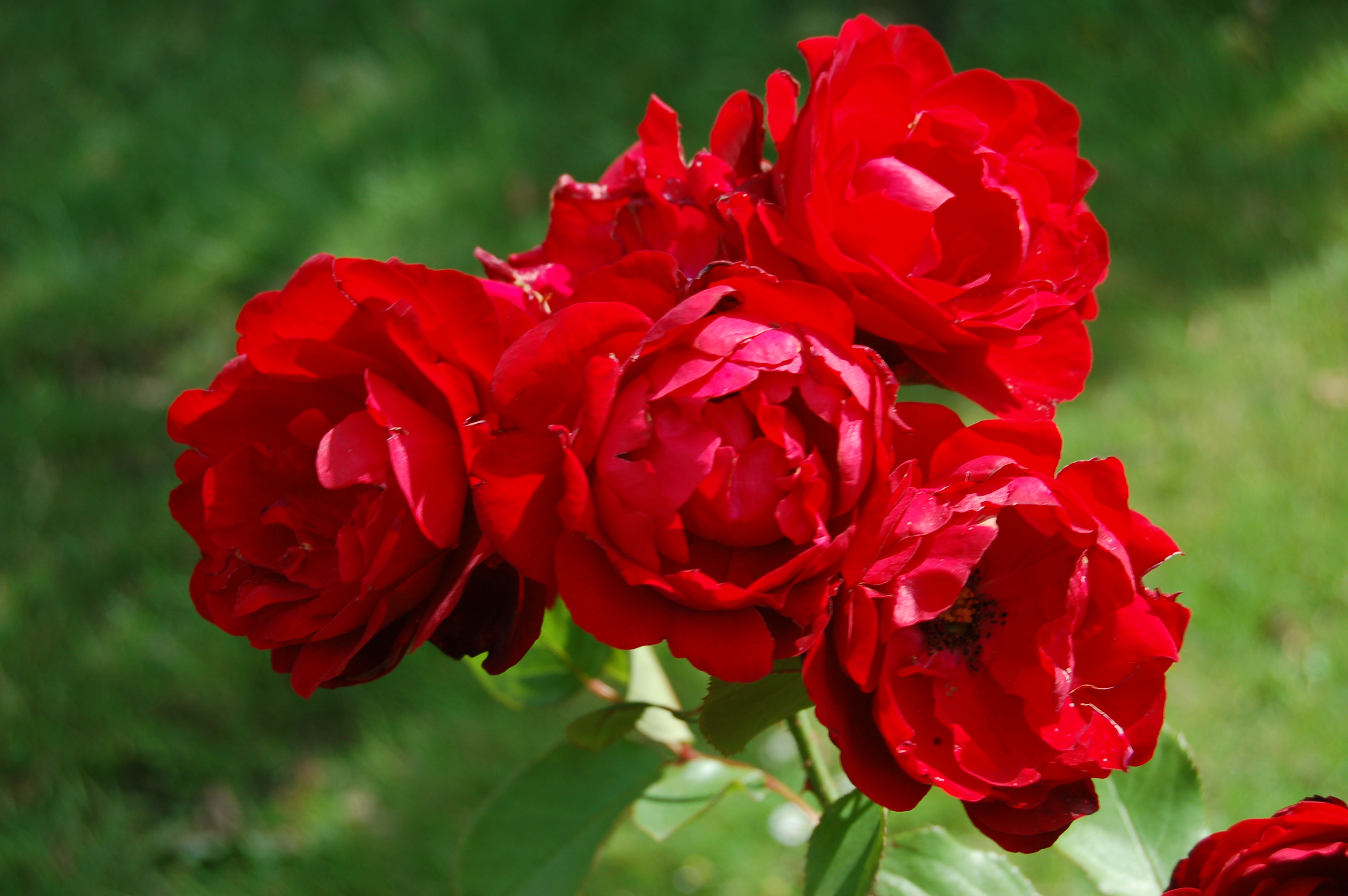 Rosa 'Lili Marleen'